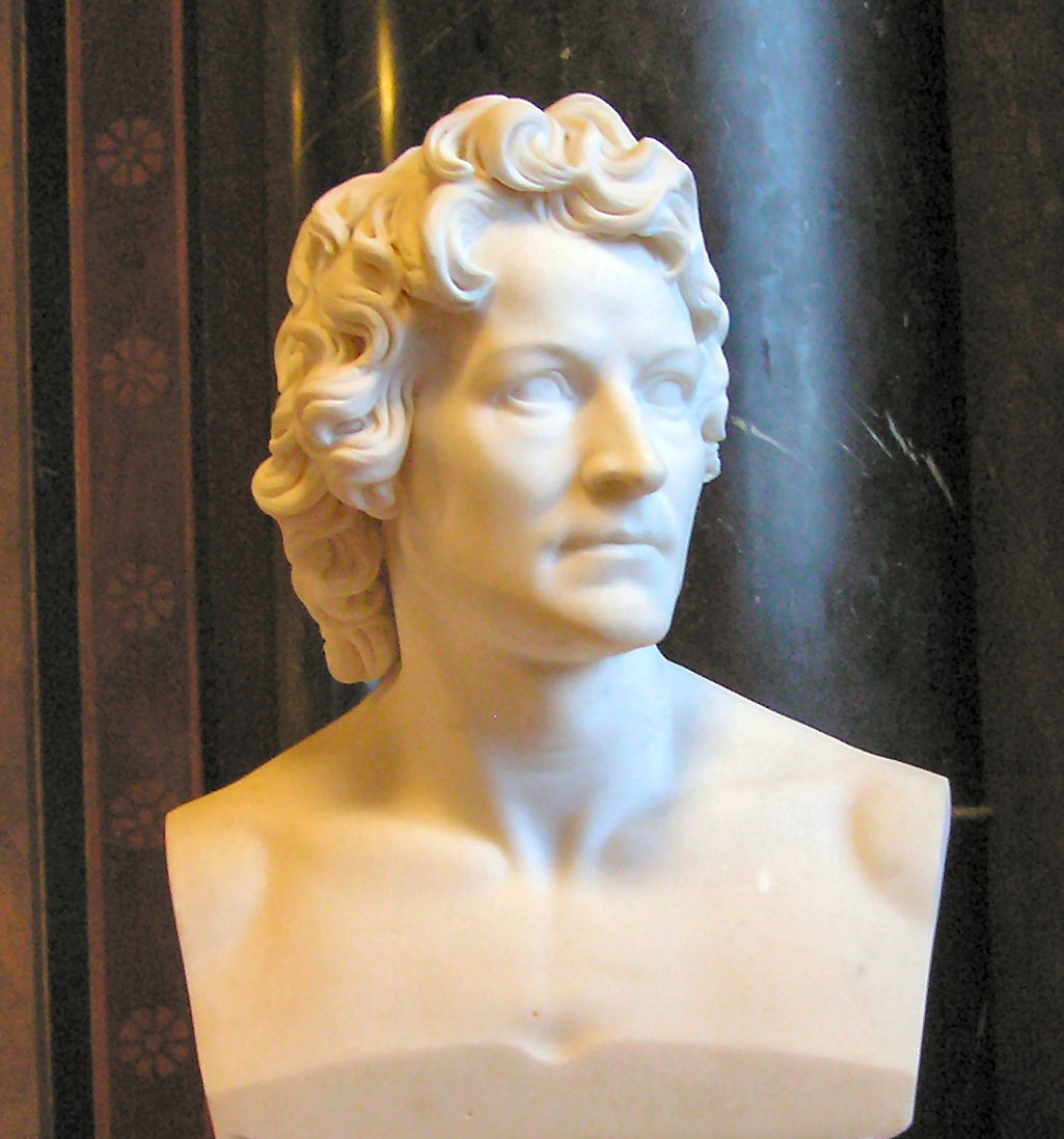 Christian Daniel Rauch: Bertel Thorvaldsen 1816, Alte Nationalgalerie, Berlin